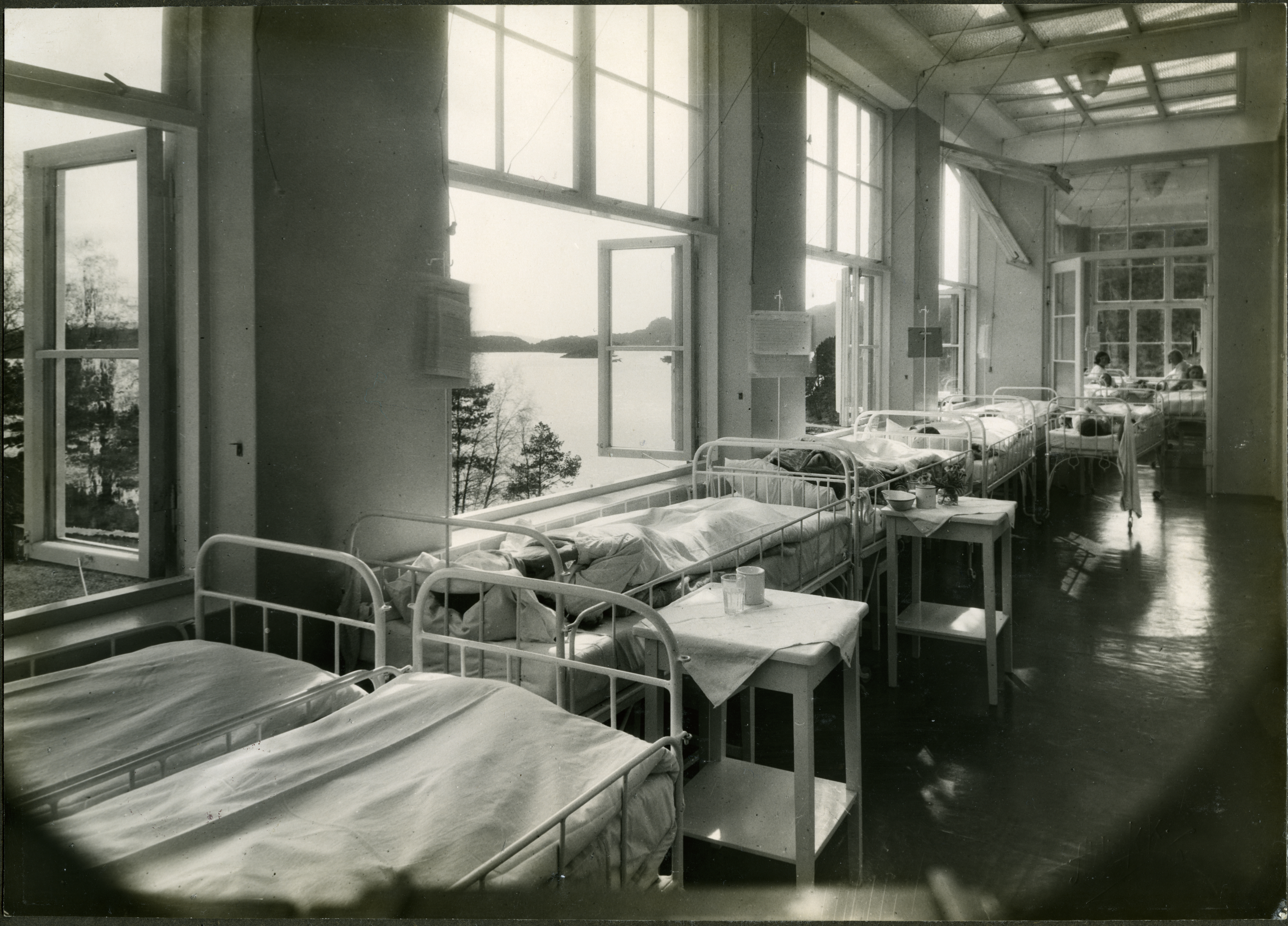 Bildet er hentet fra Arkivverket. Interiør fra sykestuesal no 8 og 9 i 3. etasje. Arkivinstitusjon : Riksarkivet Arkivnavn : Medisinaldirektøren, Overlegen for tuberkulosen/Ktr. for lege- og sunnhetsvesen, tuberkulosesaker Sted : Norge, Hordaland, , Hagevik Emneord: Sykehus, Tuberkulose Avbildet